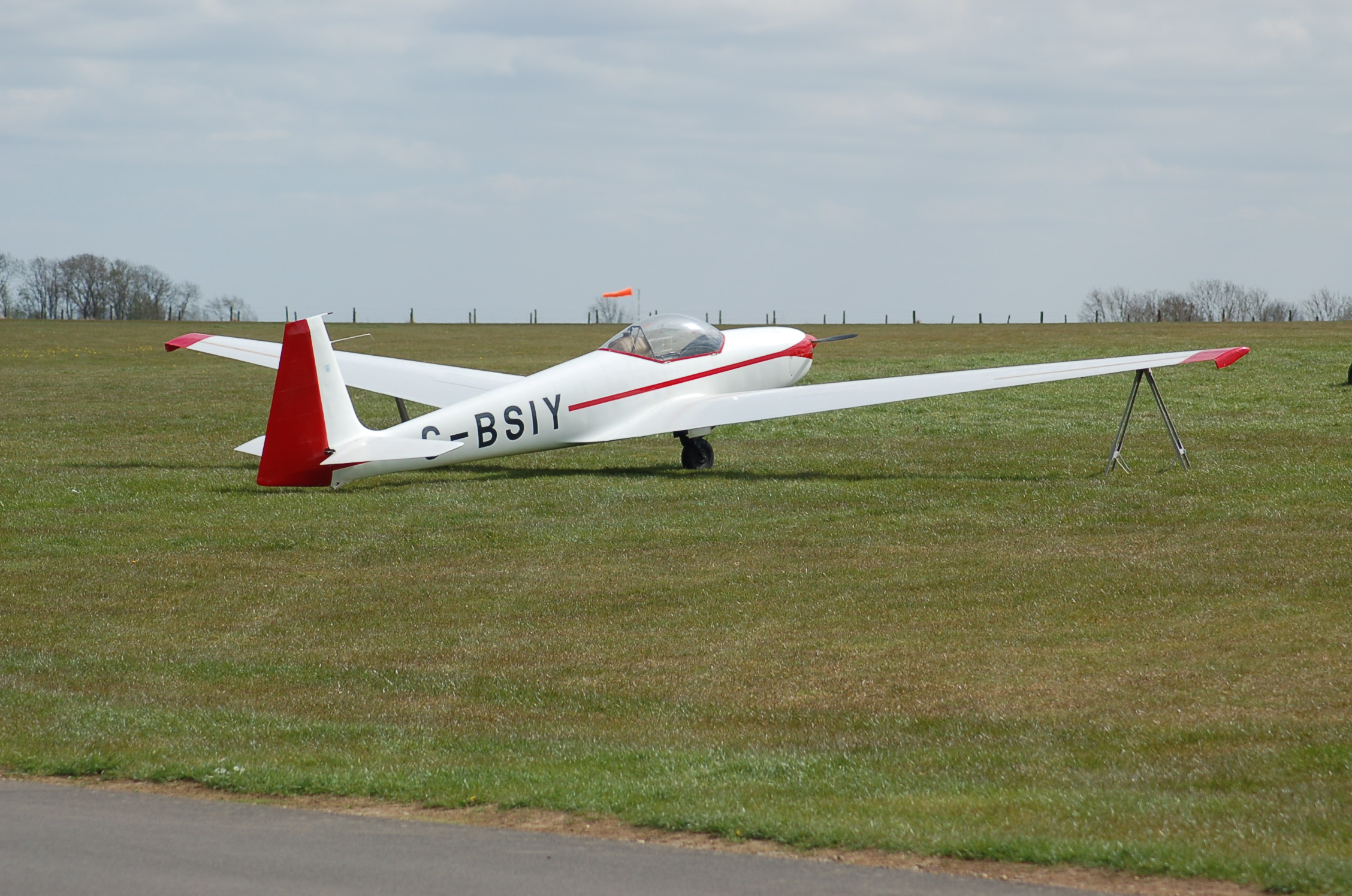 Schleicher ASK-14 at Husbands Bosworth,Leics.,03/05/13.